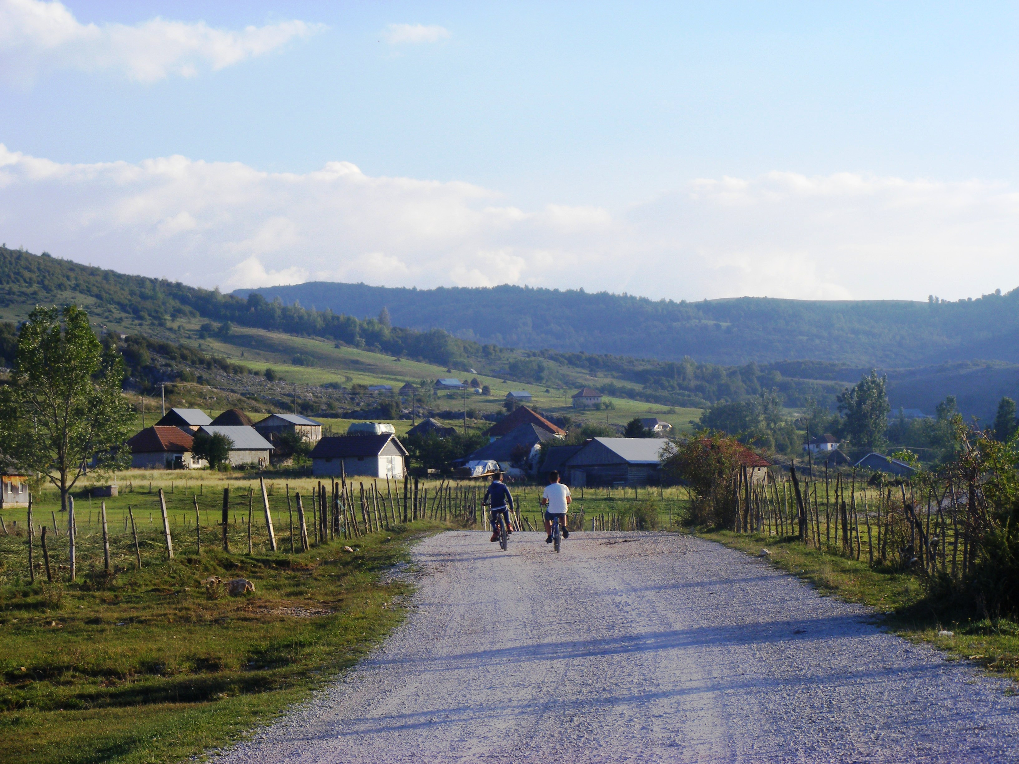 Vendbanimi Uglla, Rafshnalta e Peshterit, Sanxhak Српски (ћирилица): Ugao, Pester, Sandzak